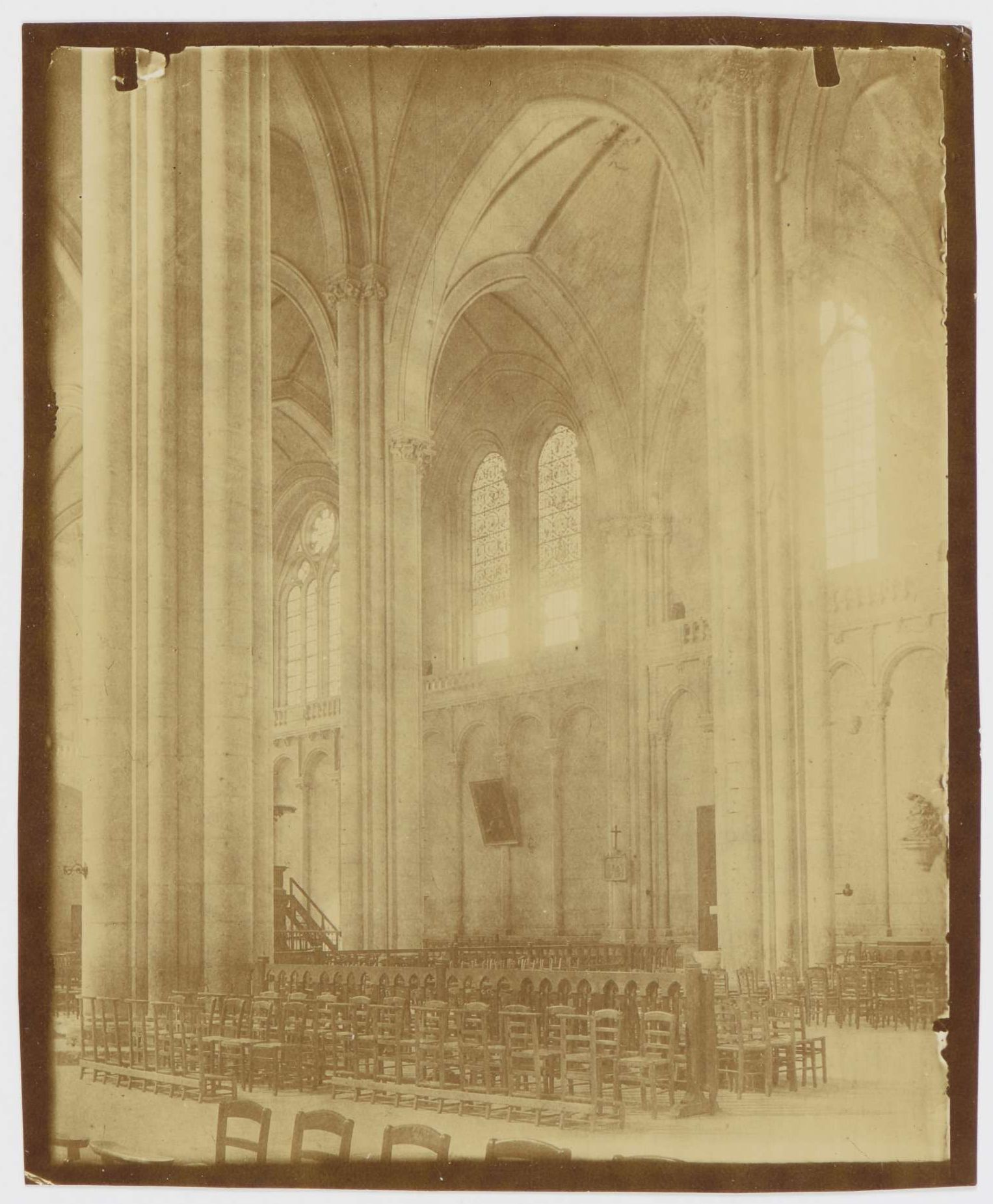 Intérieur de la cathédrale de Poitiers. Mention manuscrite à l'encre noire au recto : Cathédrale de Poitiers / Porte Ste Croix (côté sud). Échelle : 5 cm / 1 m. Photographie issue des dossiers de travaux de restauration des cathédrales (1802-1912, conservés aux Archives nationales (inventaire et documents numérisés consultables en ligne).